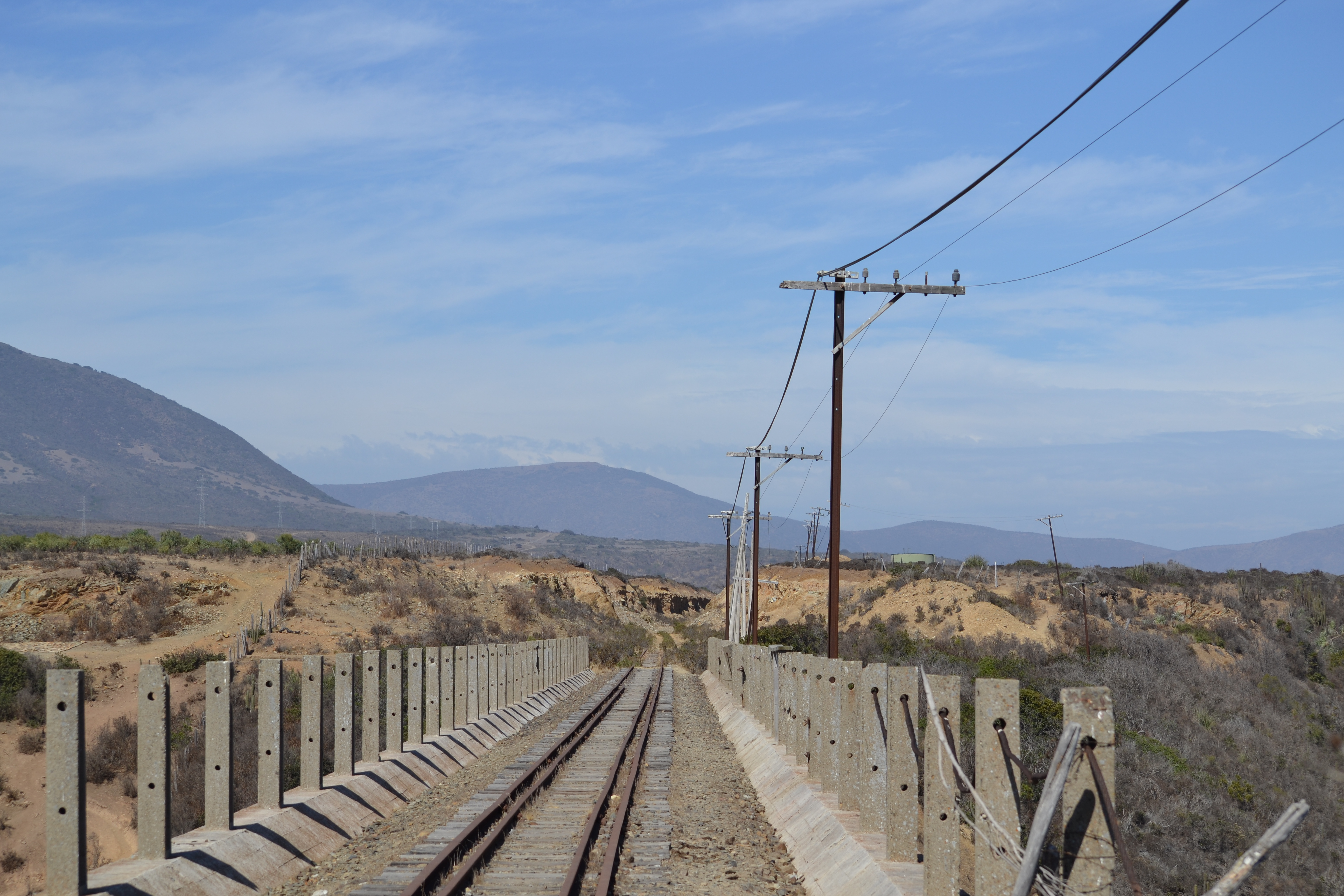 Lìnea abandonada sobre quebrada El Chivato en Los Molles